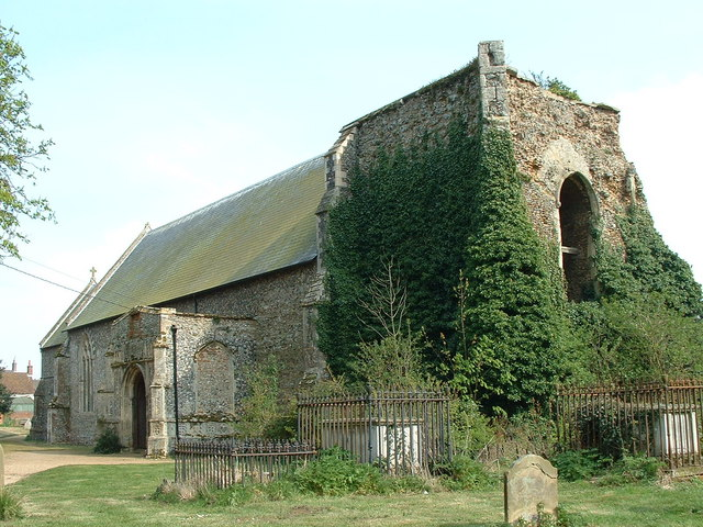 St Andrews Alderton